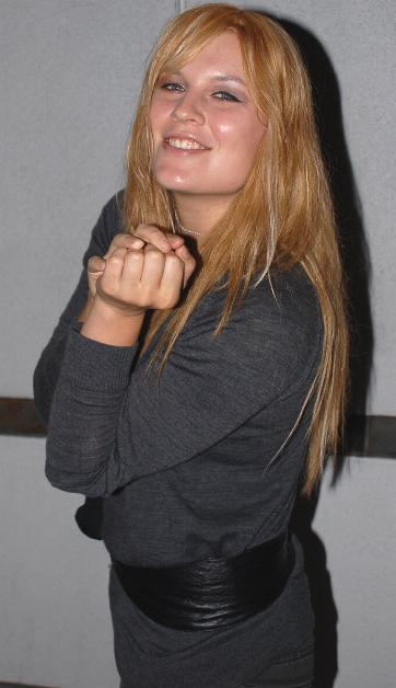 Oct 29, 2007: Fuego Movie Premiere at AMC In Marina Del Ray